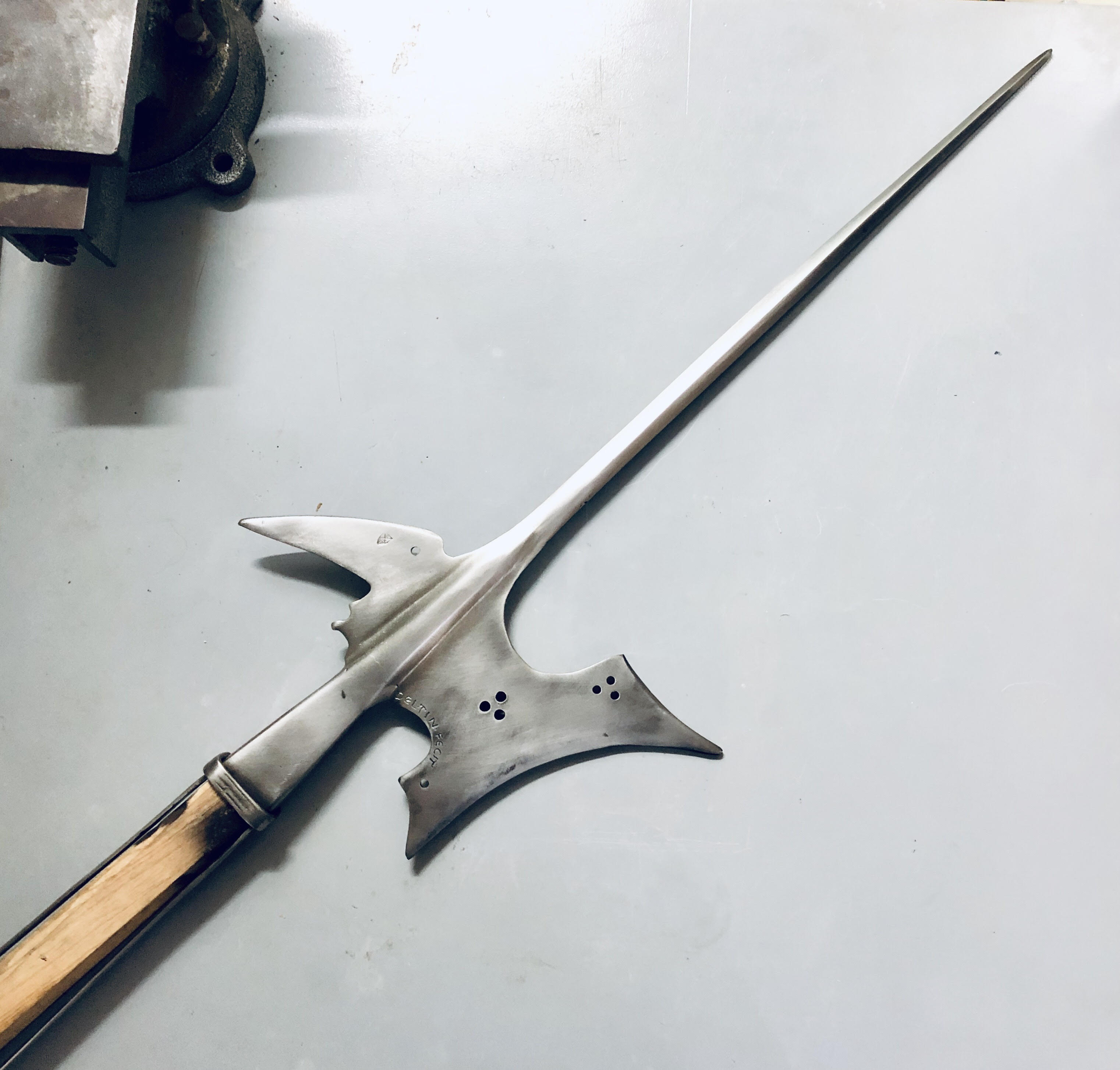 הלבארד